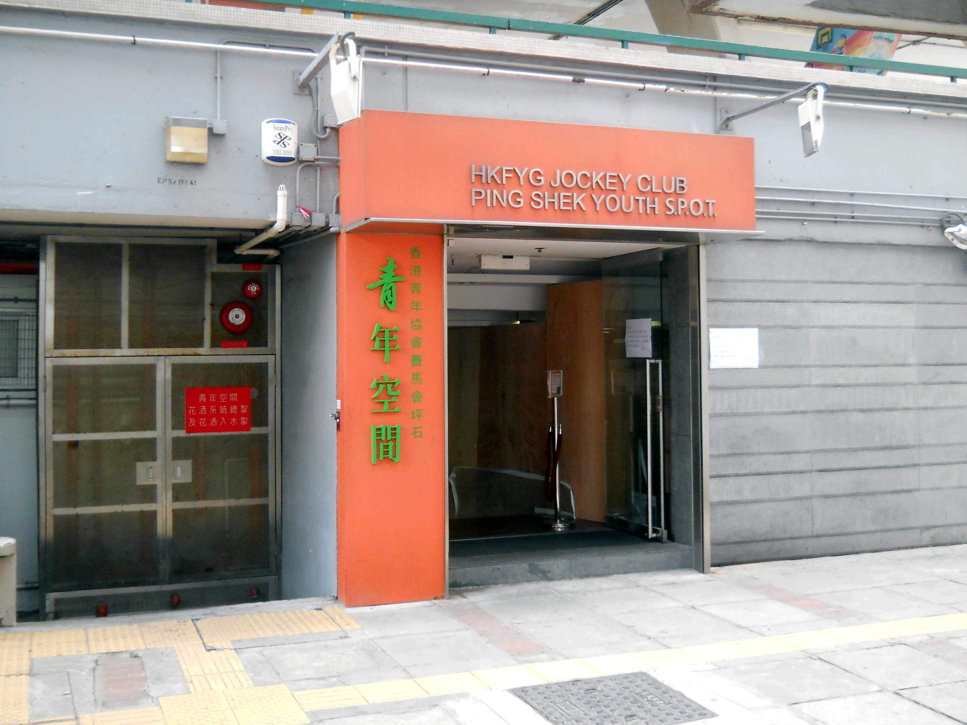 中文（香港）: 香港青年協會坪石青年空間